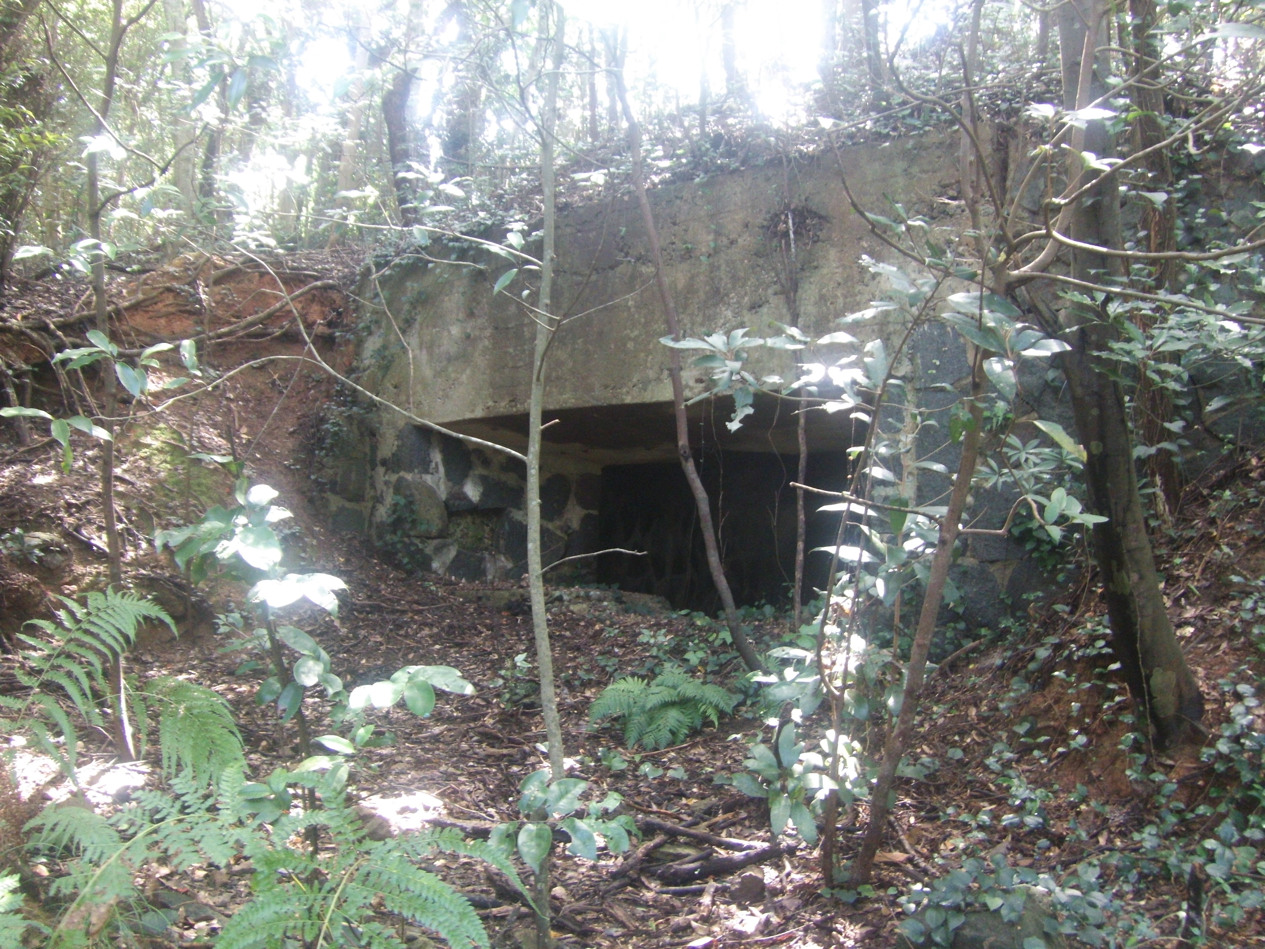 長崎県佐世保市黒島の古里集落山中にある旧日本軍の砲台跡、日本遺産「鎮守府－横須賀・呉・佐世保・舞鶴」の構成資産の一つになっている